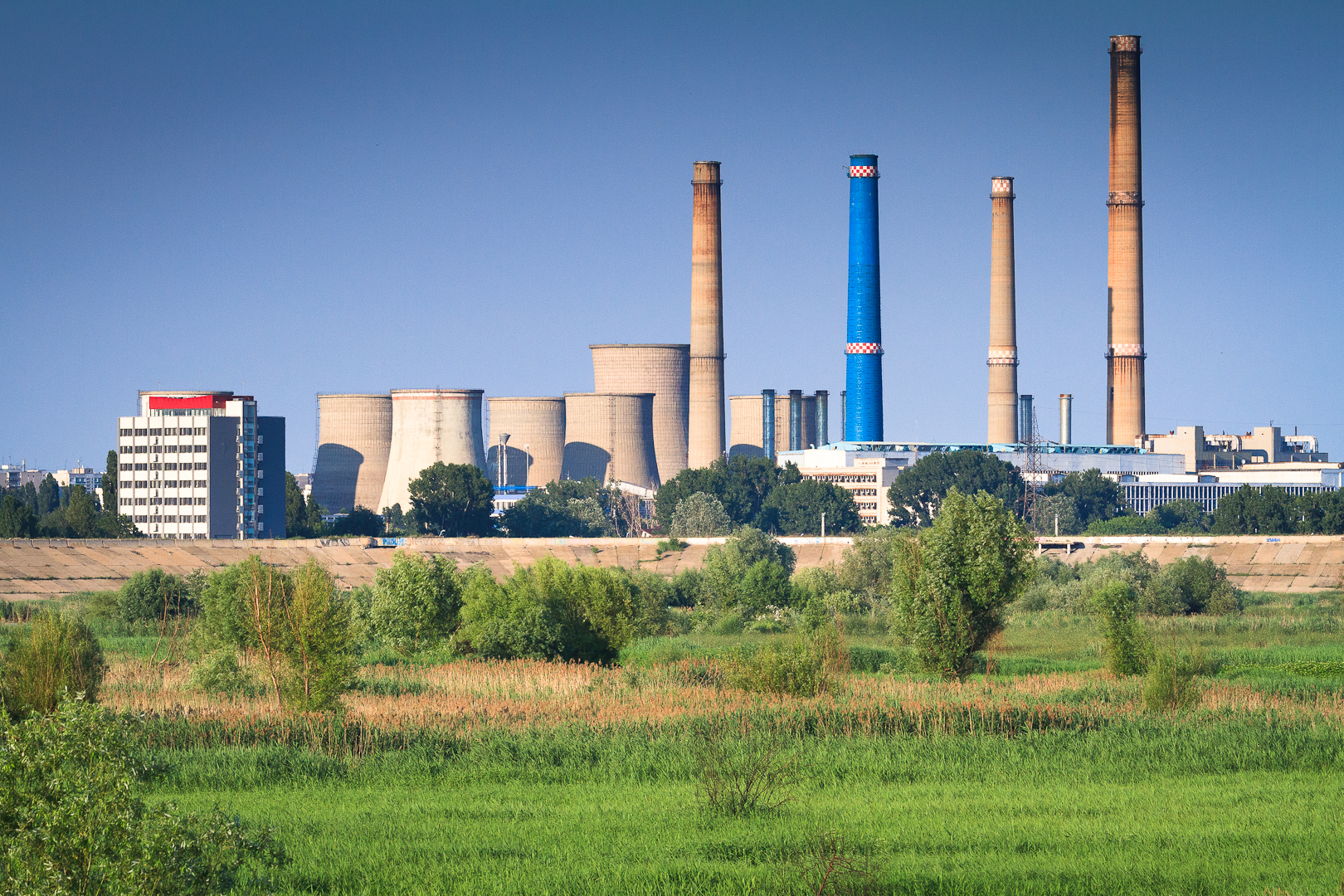 CET Sud - Lacul Vacaresti